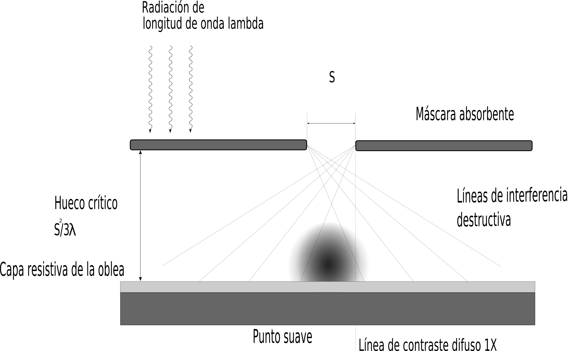 La imagen corresponde a un esquema del procedimiento de fotolitografía de Rayos X. En la imagen se observan los parámetros característicos de este tipo de proceso. El punto dulce es un lugar geométrico. Obsérvese la dispersión de la radiación a su paso por la rendija de anchura S. El autor cede todos los derechos sobre esta imagen.